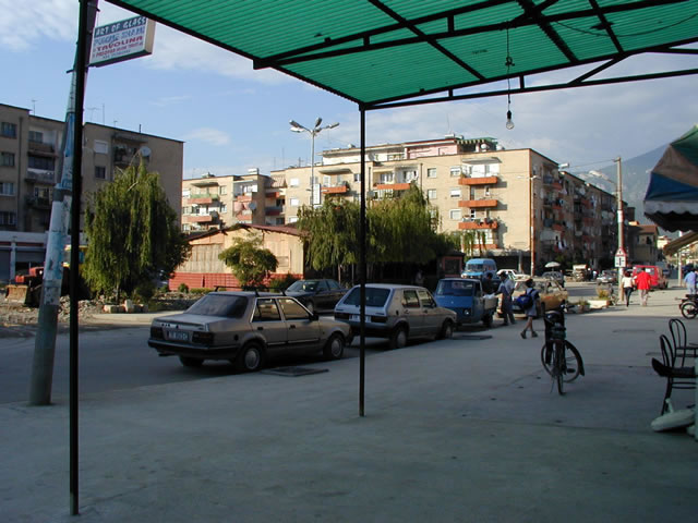 Qendra e Xhamllikut